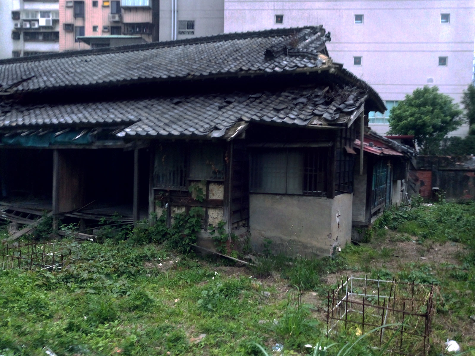 南昌路二段2巷2、4號